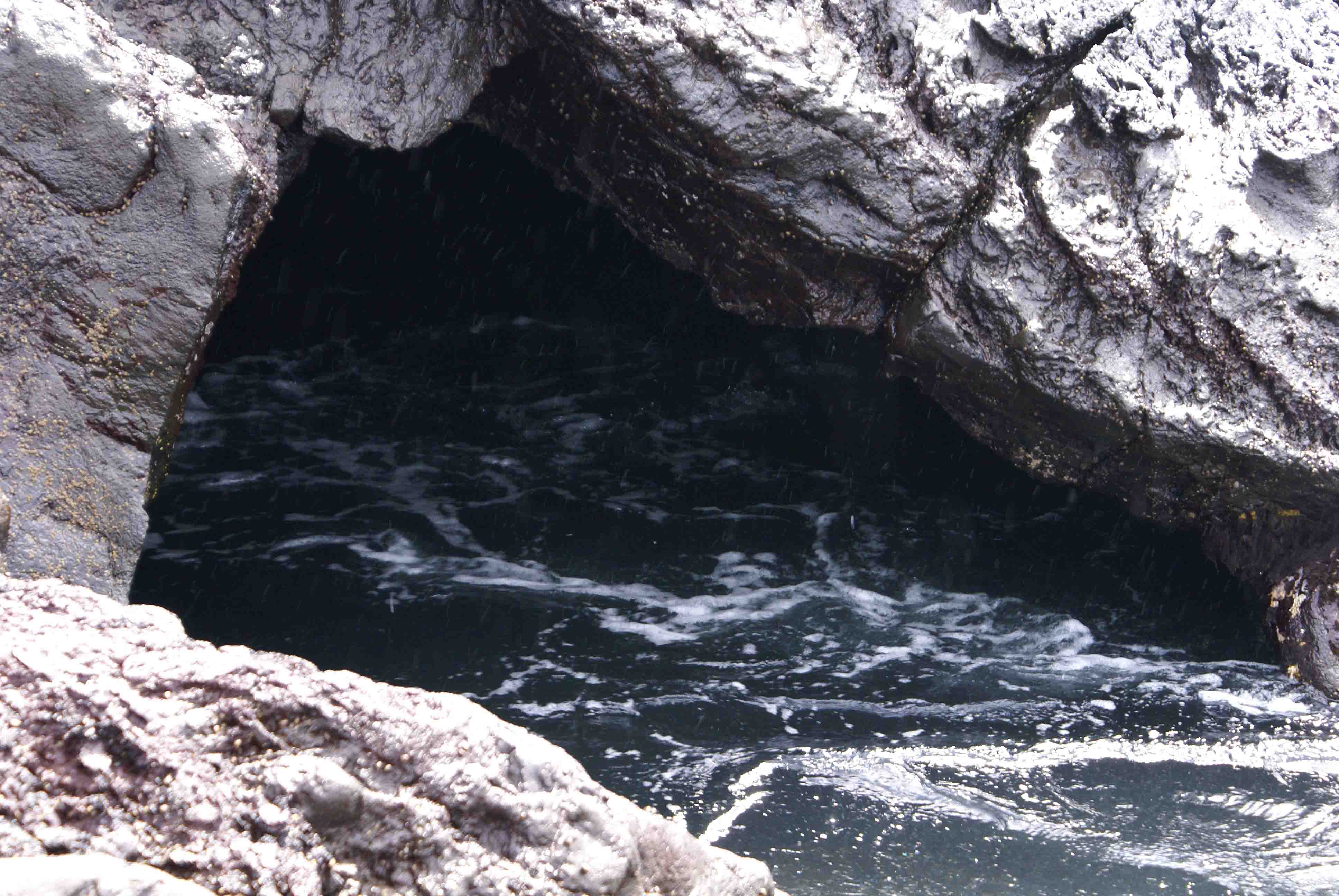 Gruta de origem vulcânica junto à Costa da Baía de Villa Maria, ilha Terceira, Açores, Portugal